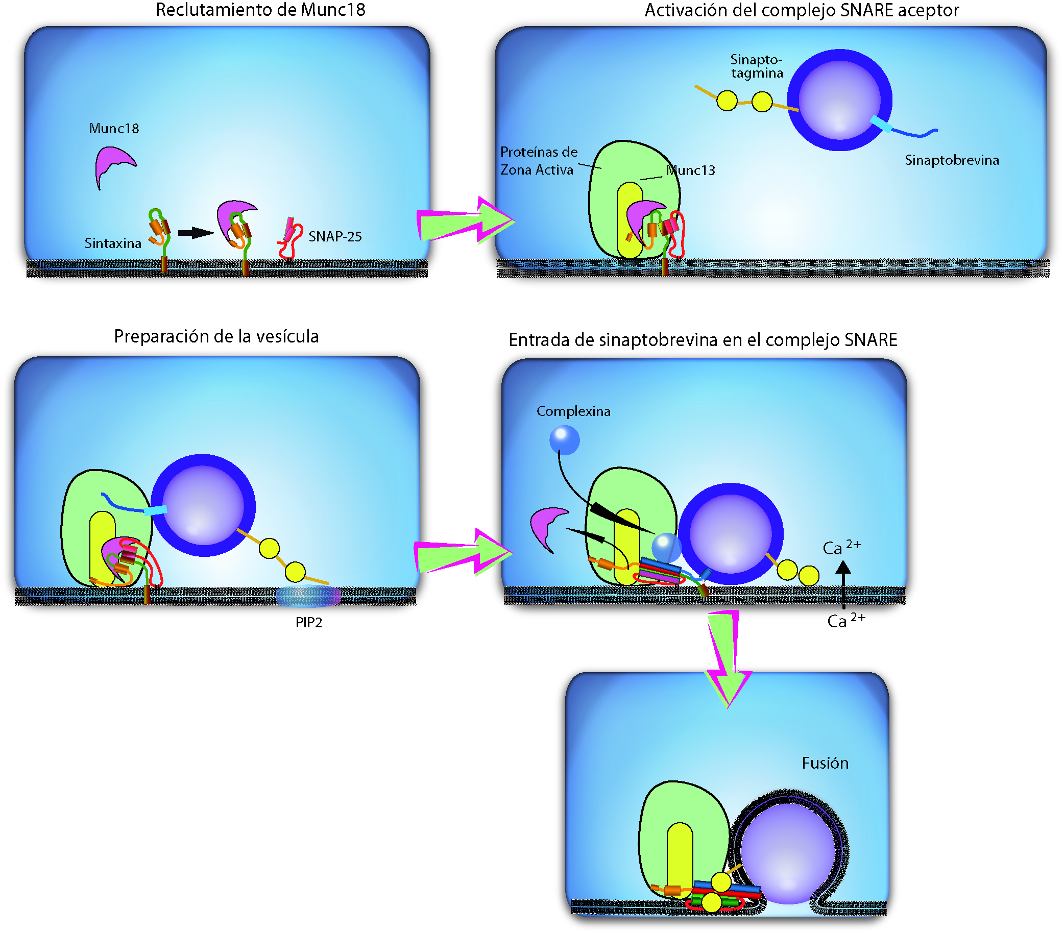 Sequence of synaptic vesicular fusion